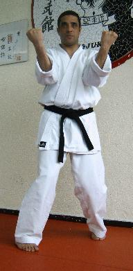 Auteur : Franck Duboisse